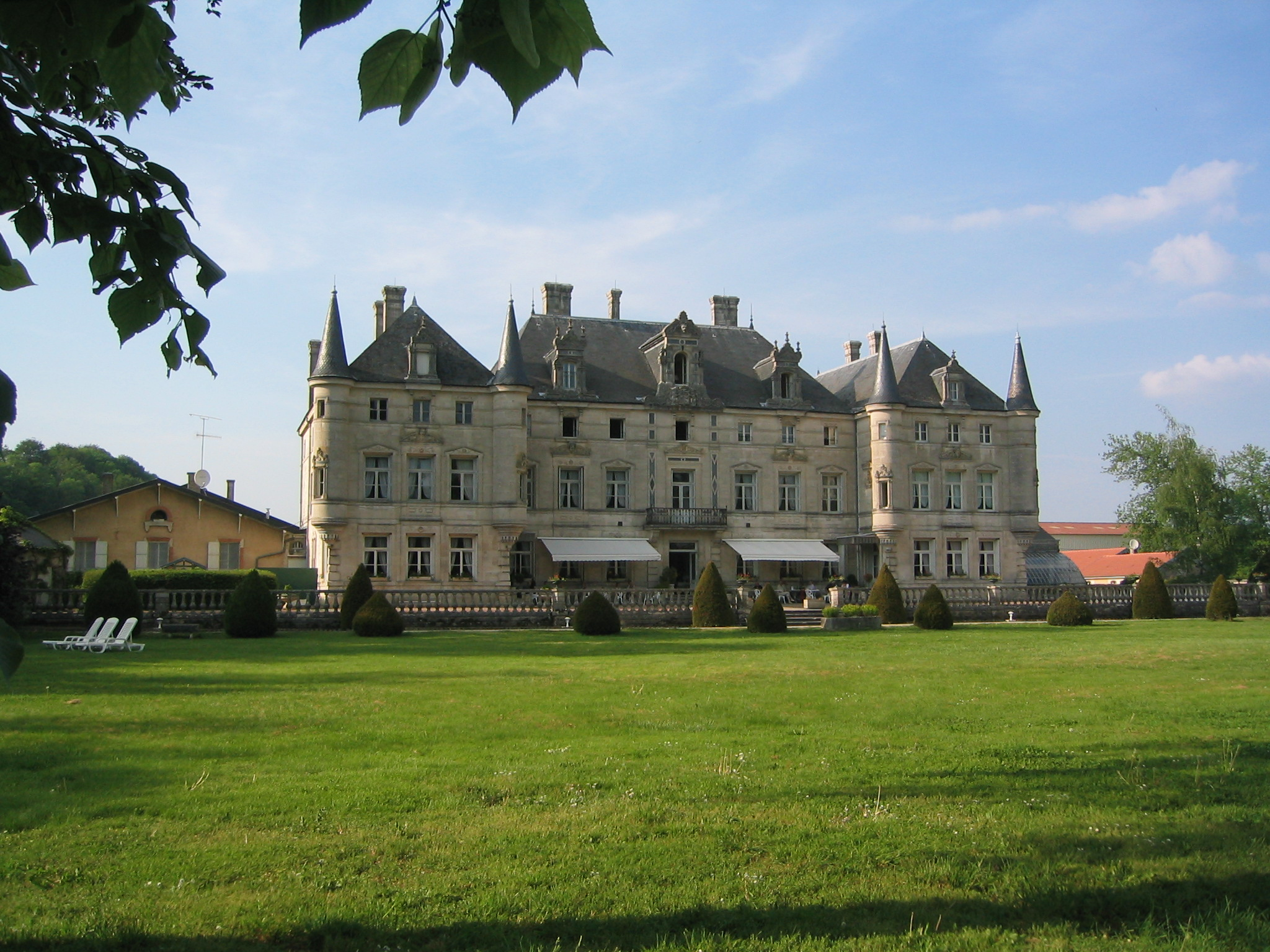 Le château des Monthairons (Meuse, France)